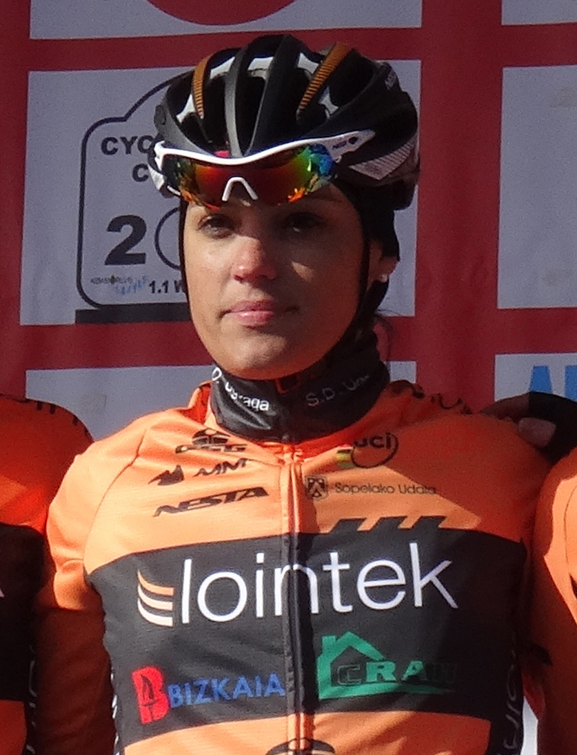 Fanny Riberot